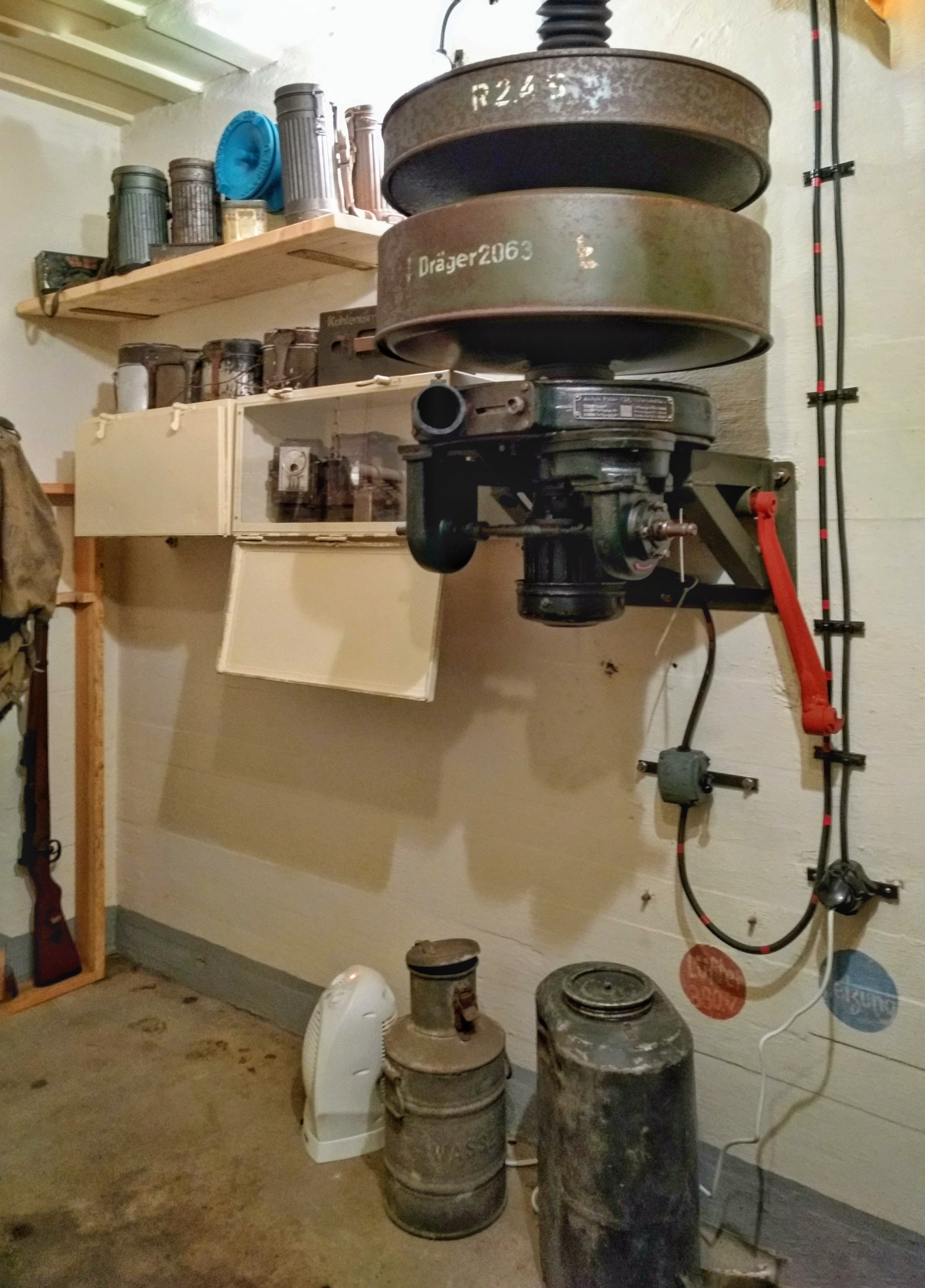 B-Werk Besseringen